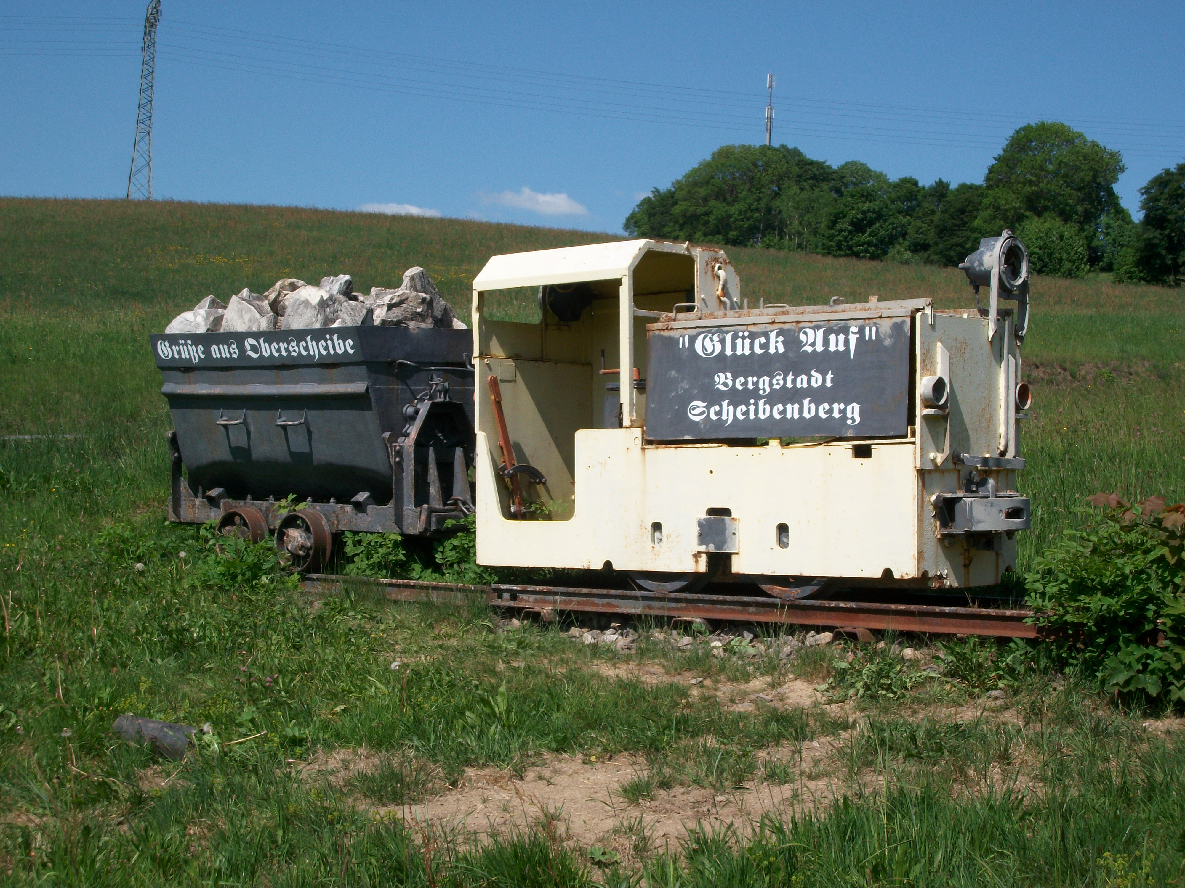 Schibenberg und Oberscheibe, symbolischer Zug